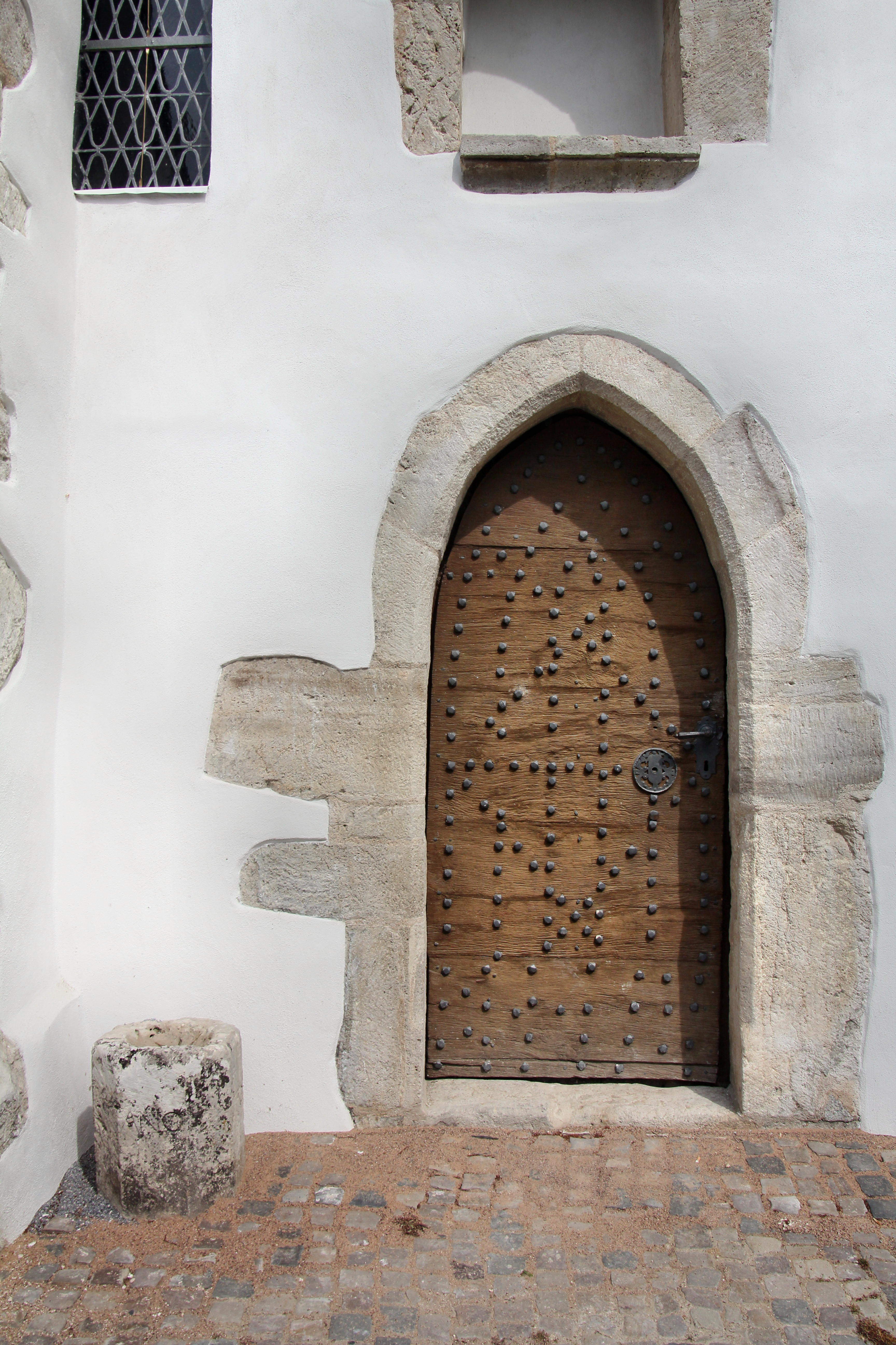 Eingangstür der Kluskapelle Marsberg-Giershagen This is a photograph of an architectural monument.